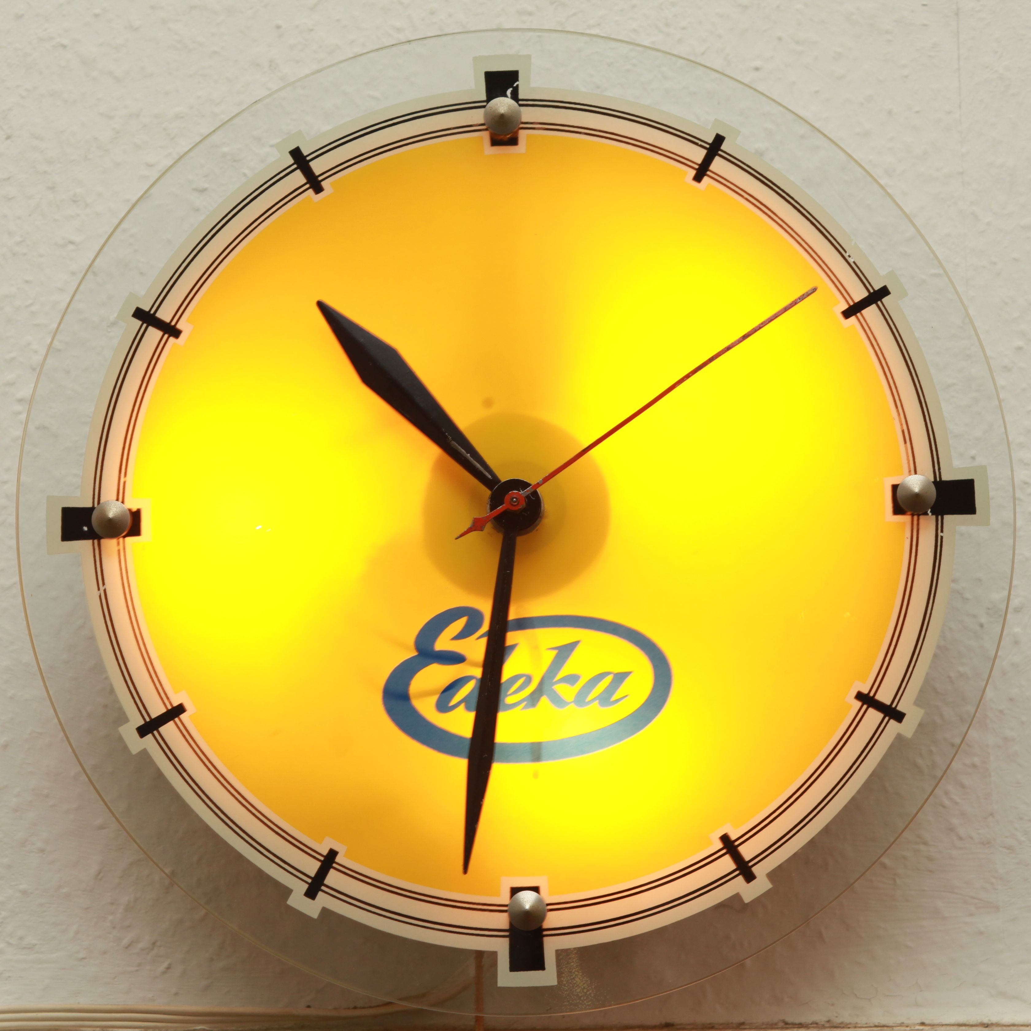 Beleuchtete Edeka Werbeuhr mit Synchronwerk. Uhren dieser Art gab es in den 50er Jahren mit vielen verschiedenen Werbeaufdrucken.